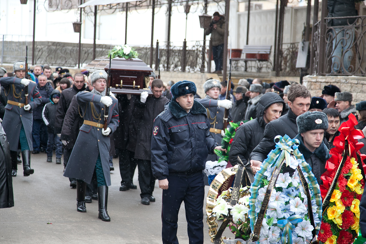 Волгоградцы прощаются с жертвами терактов